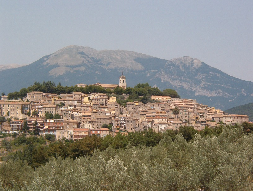 Questa foto è stata scattata da me. Ne autorizzo il libero utilizzo su Wikipedia